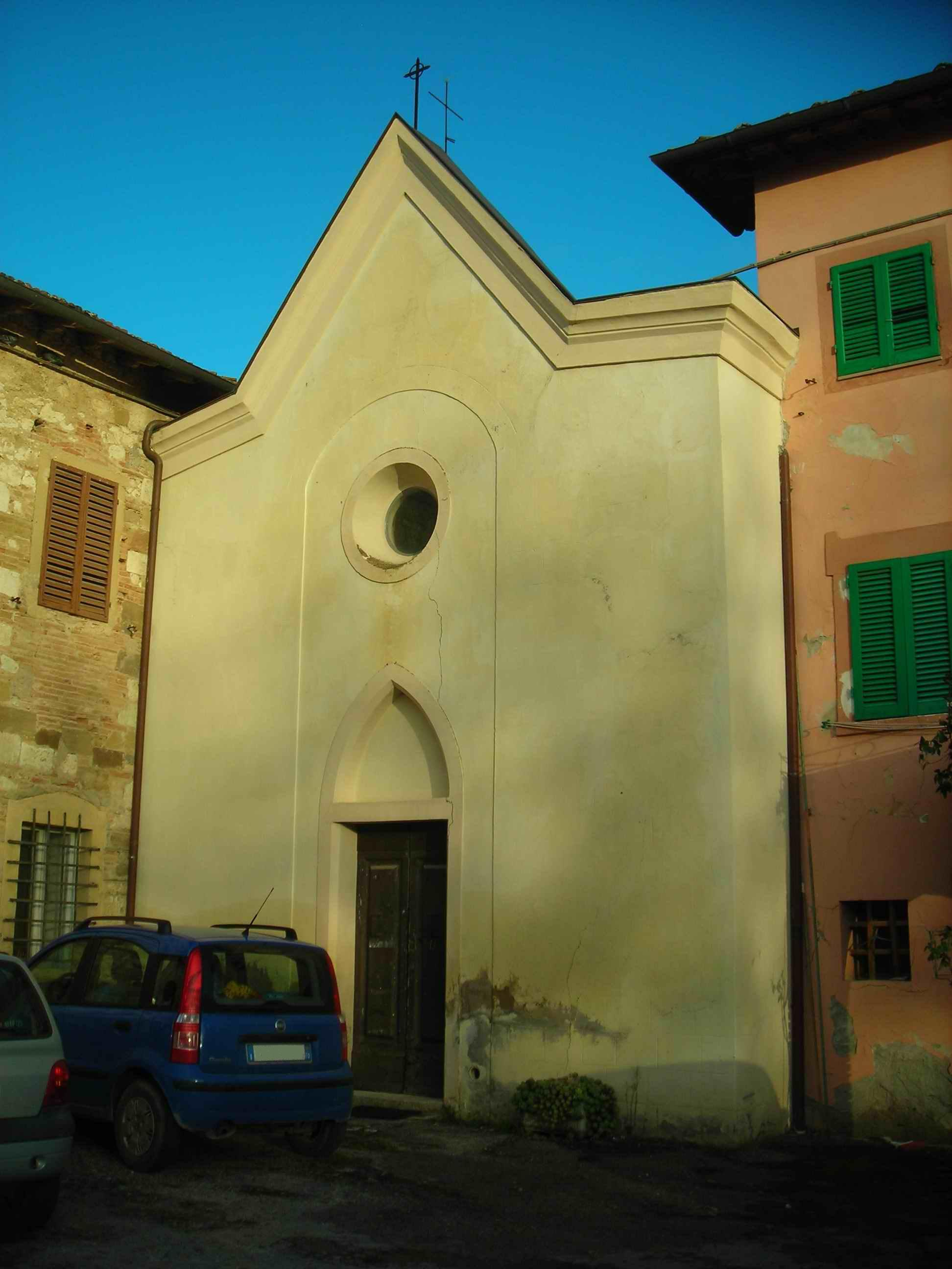 Colle di Val d'Elsa (Siena - Italia): Chiesa di Borgatello